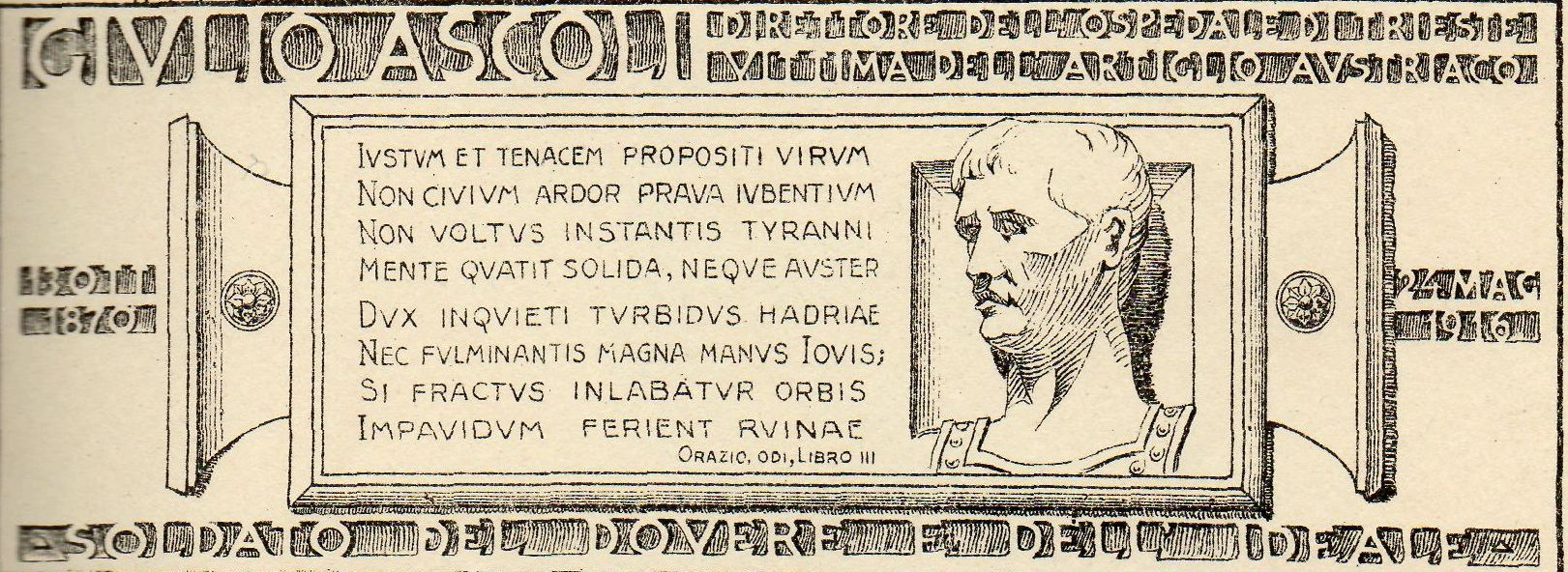 riproduzione di un'epigrafe che riporta una citazione di Orazio e i dati della vita di Giulio Ascoli